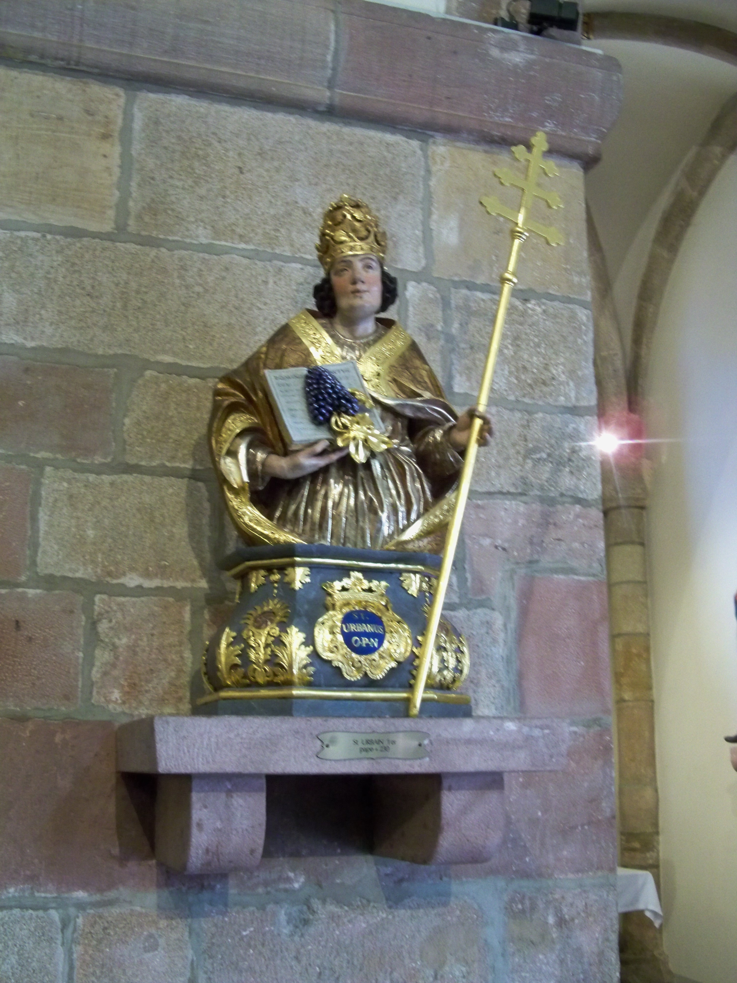 St Urban à l'Église Sainte Anne (Turckheim)